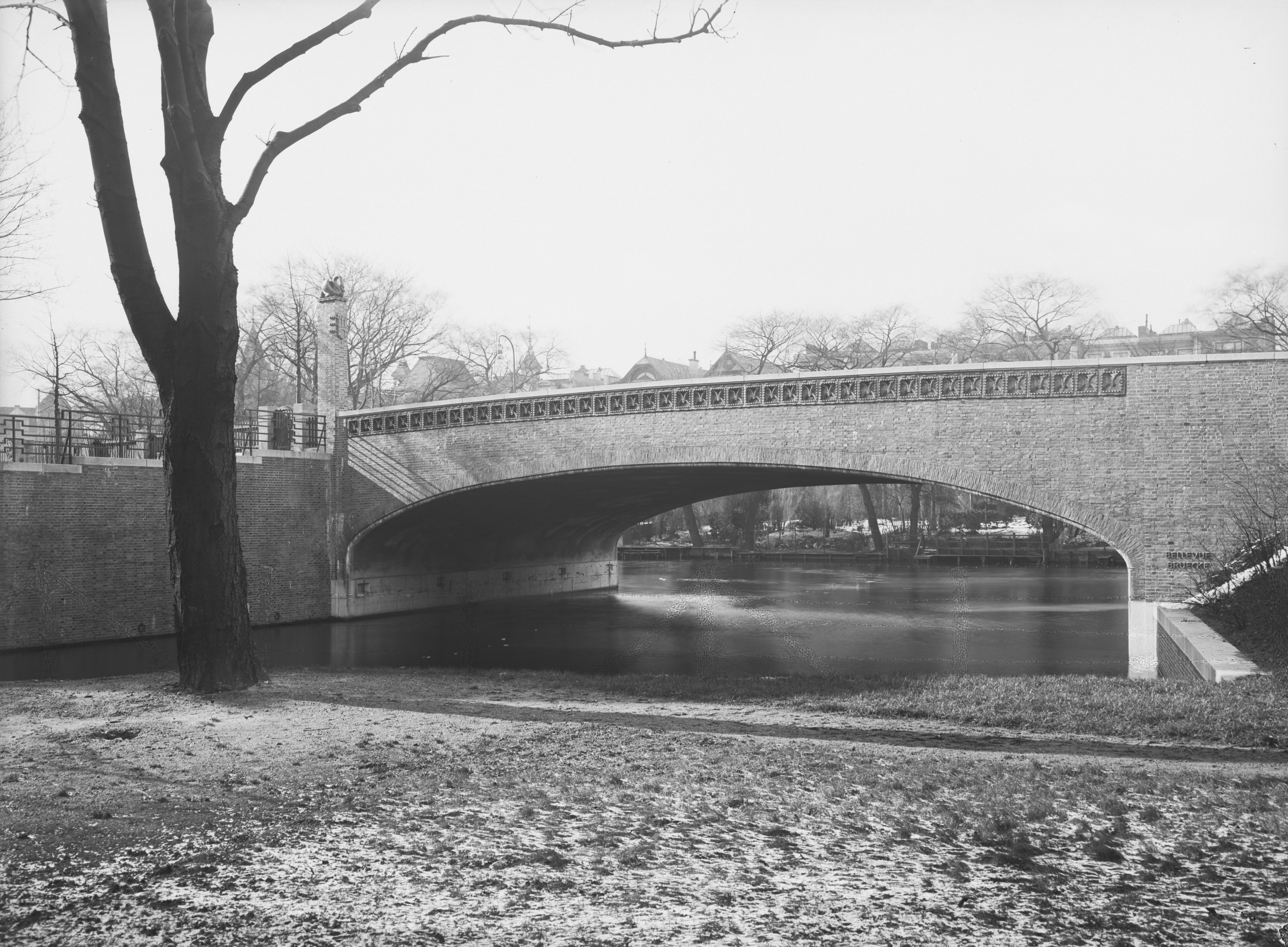 Bellevuebrücke (Hamburg-Winterhude): Ansicht SchumacherWV Nr. 262